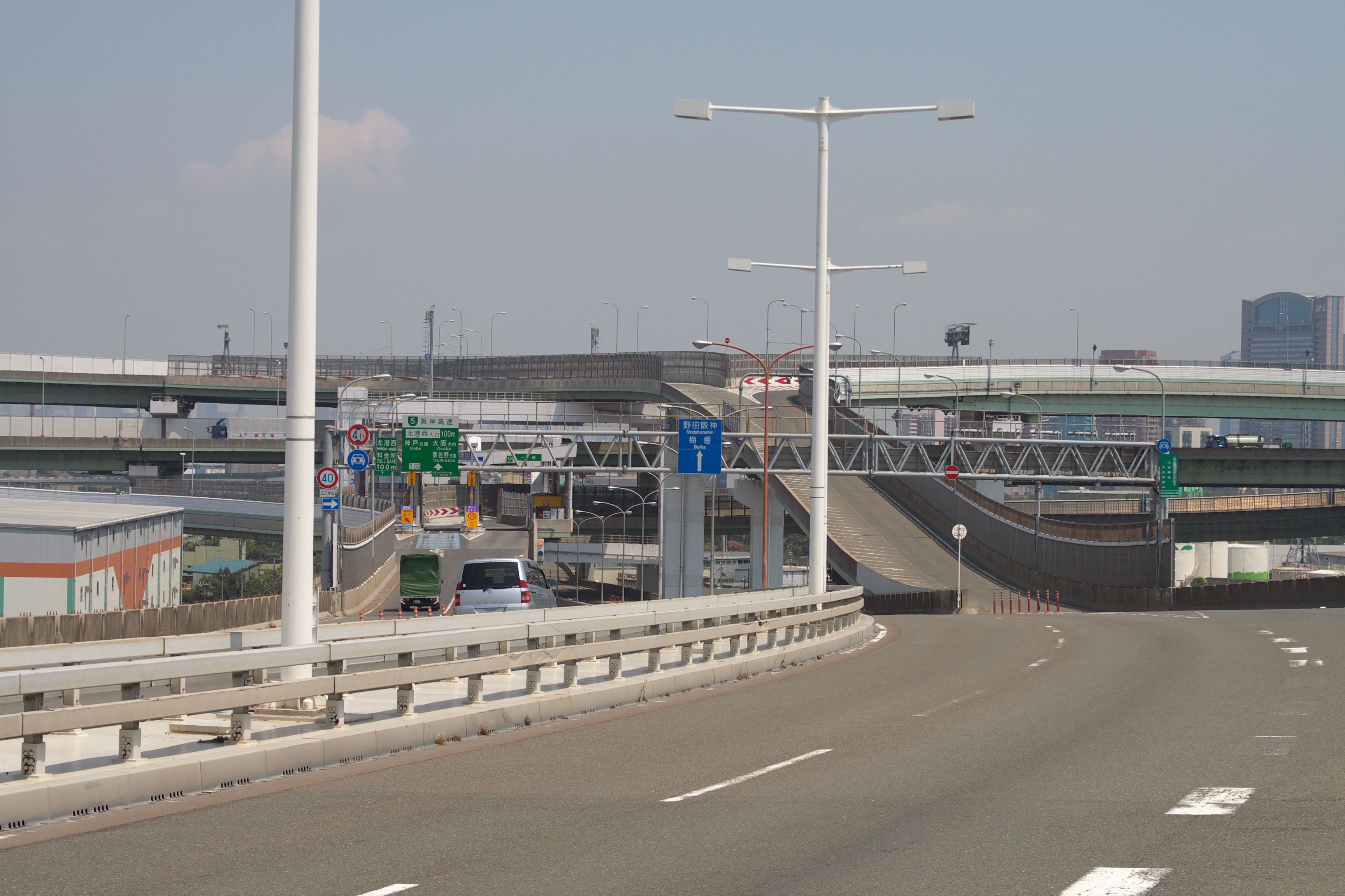 阪神高速道路 北港西入口（大阪市, 日本）